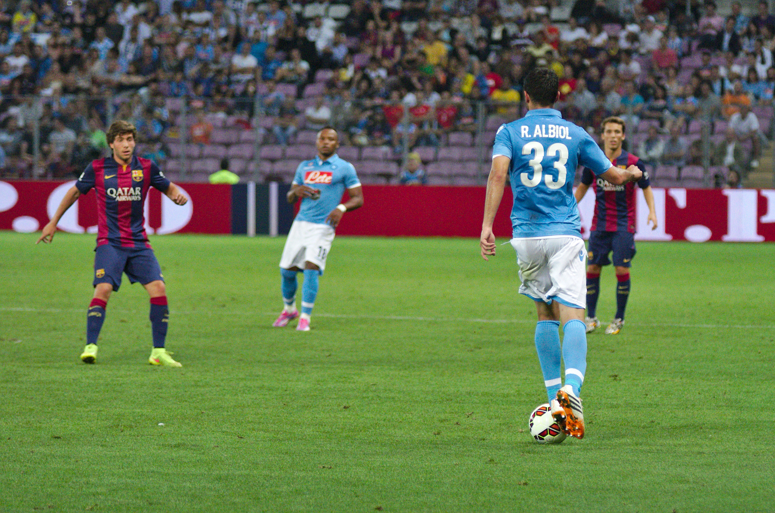 Barça - Napoli - 20140806